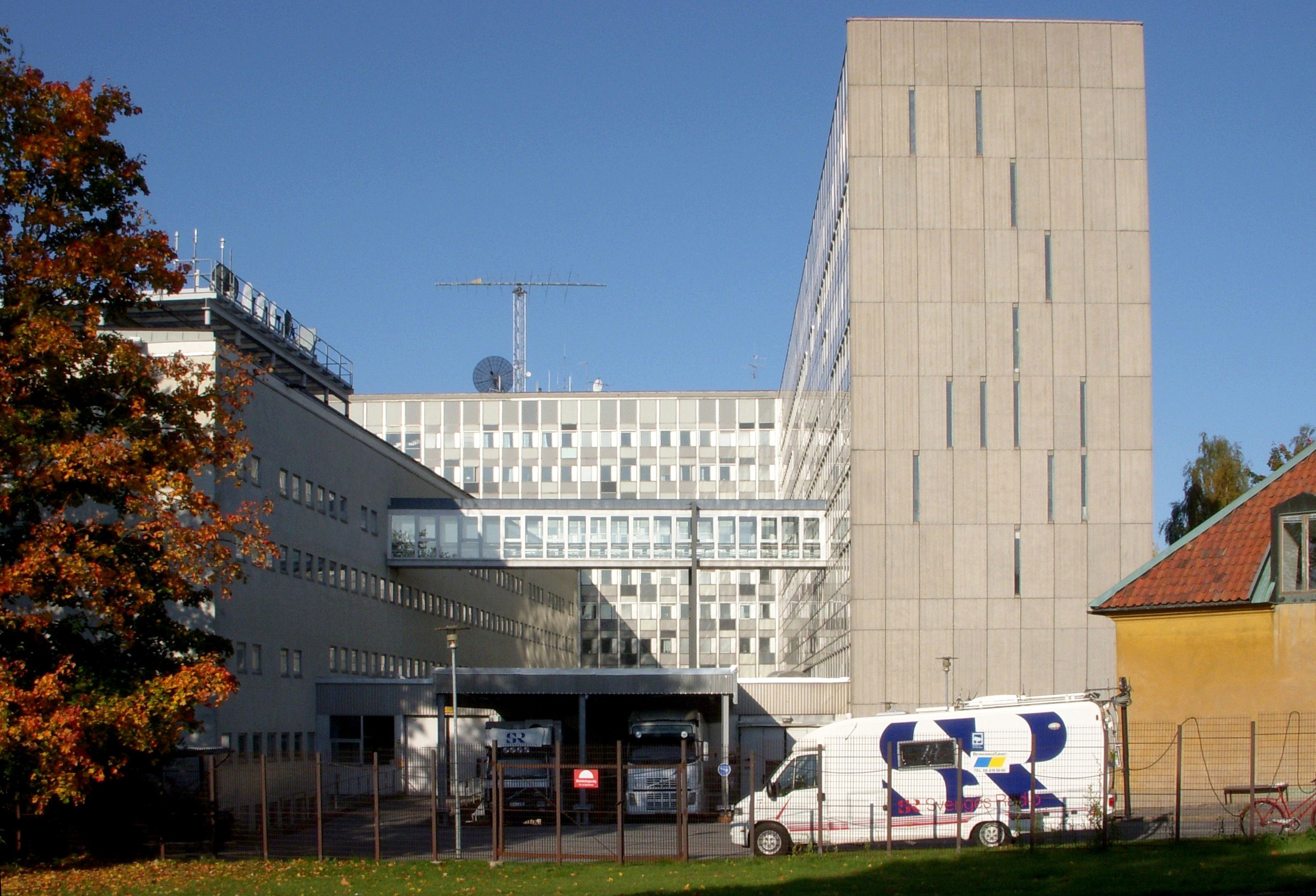 Sveriges Radio, byggnad i Stockholm